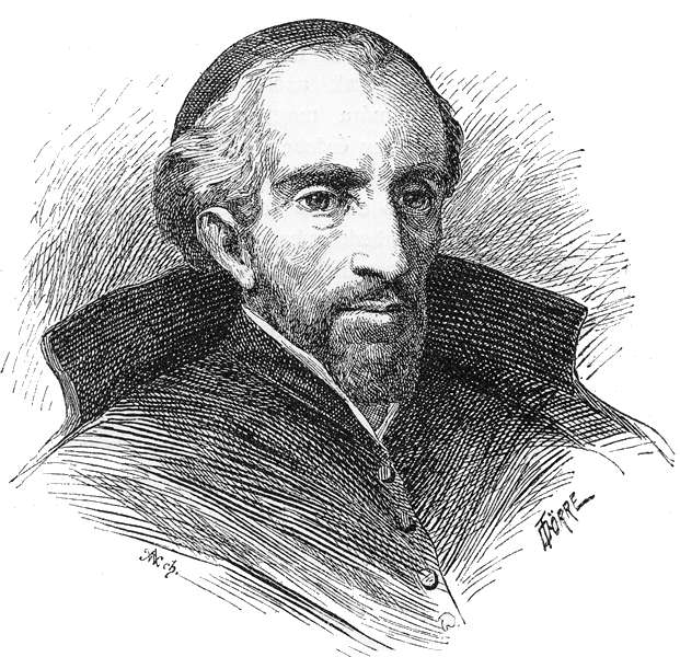 Káldi György (1573–1634) jezsuita szerzetes, bibliafordító portréja. Dörre Tivadar korabeli festmény alapján készült rajza